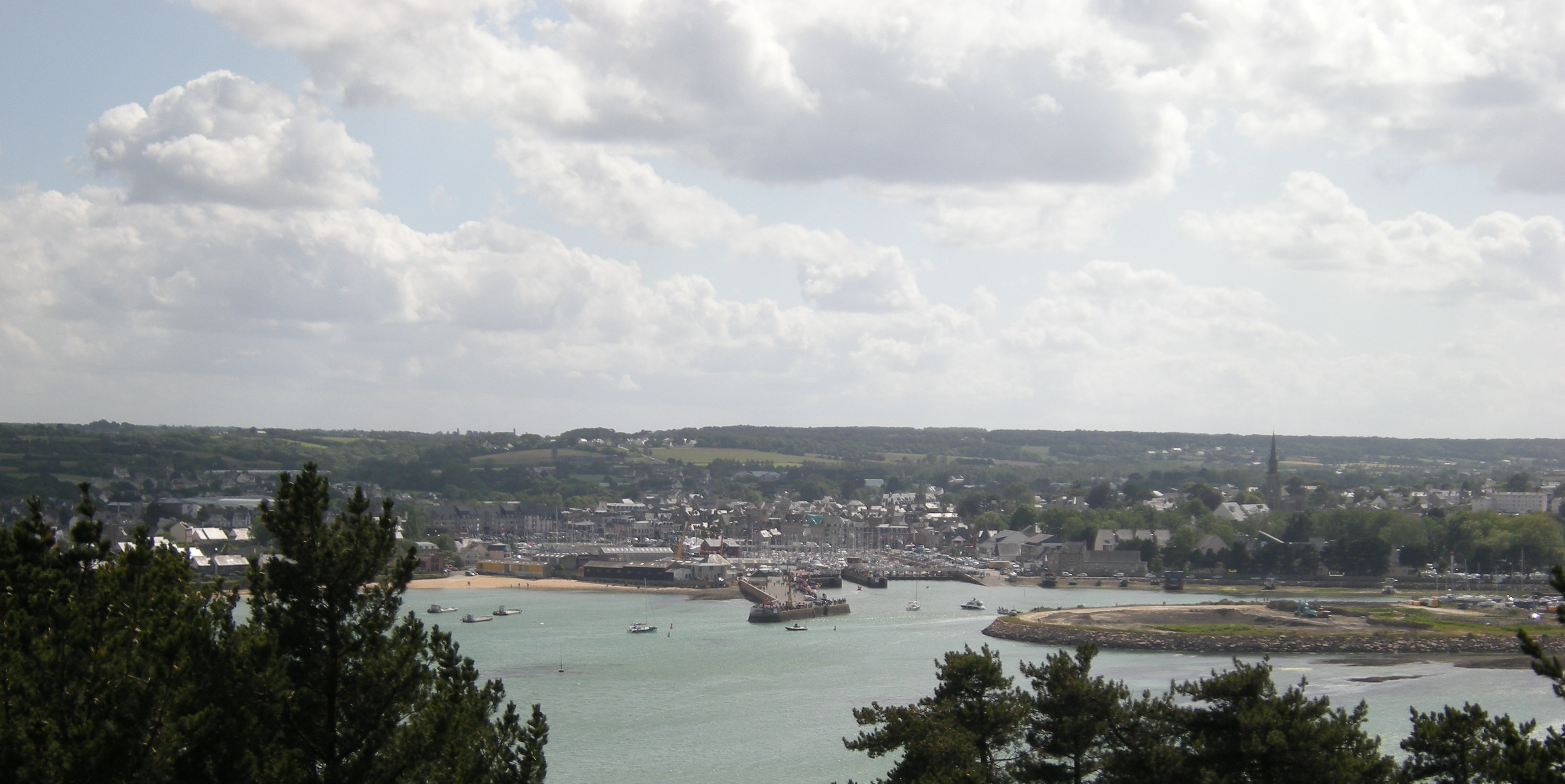 Paimpol. Vue vers le sud-est depuis la tour de Kerroc'h. A droite, la levée en pierres de forme arrondie est le quai de la zone industrielle des Salles. Le ruisseau du Traou se déverse immédiatement derrière ce quai. Au cente à mi-plan, la jetée à gauche du port de Paimpol.